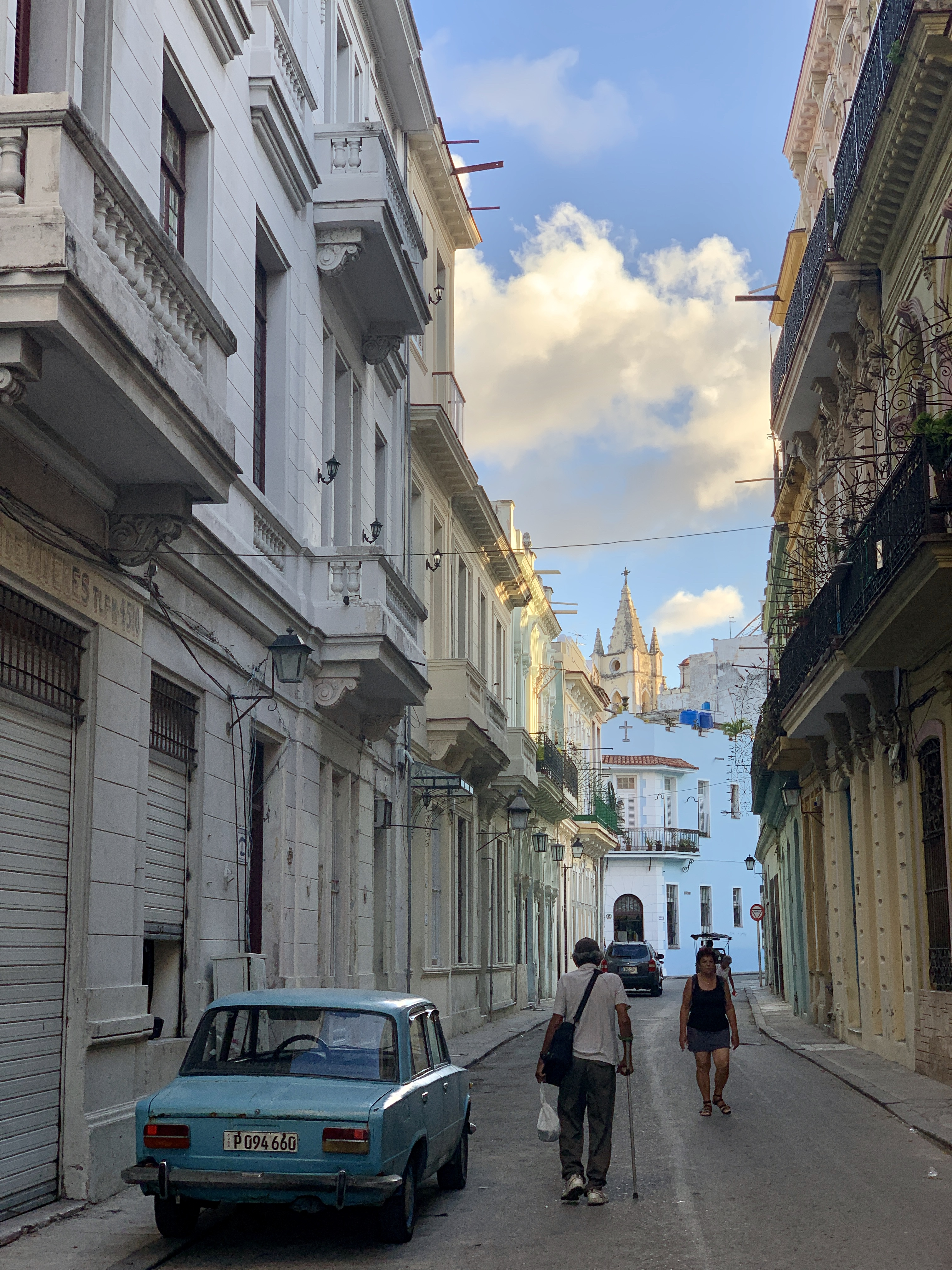 Calle en La Habana, Cuba